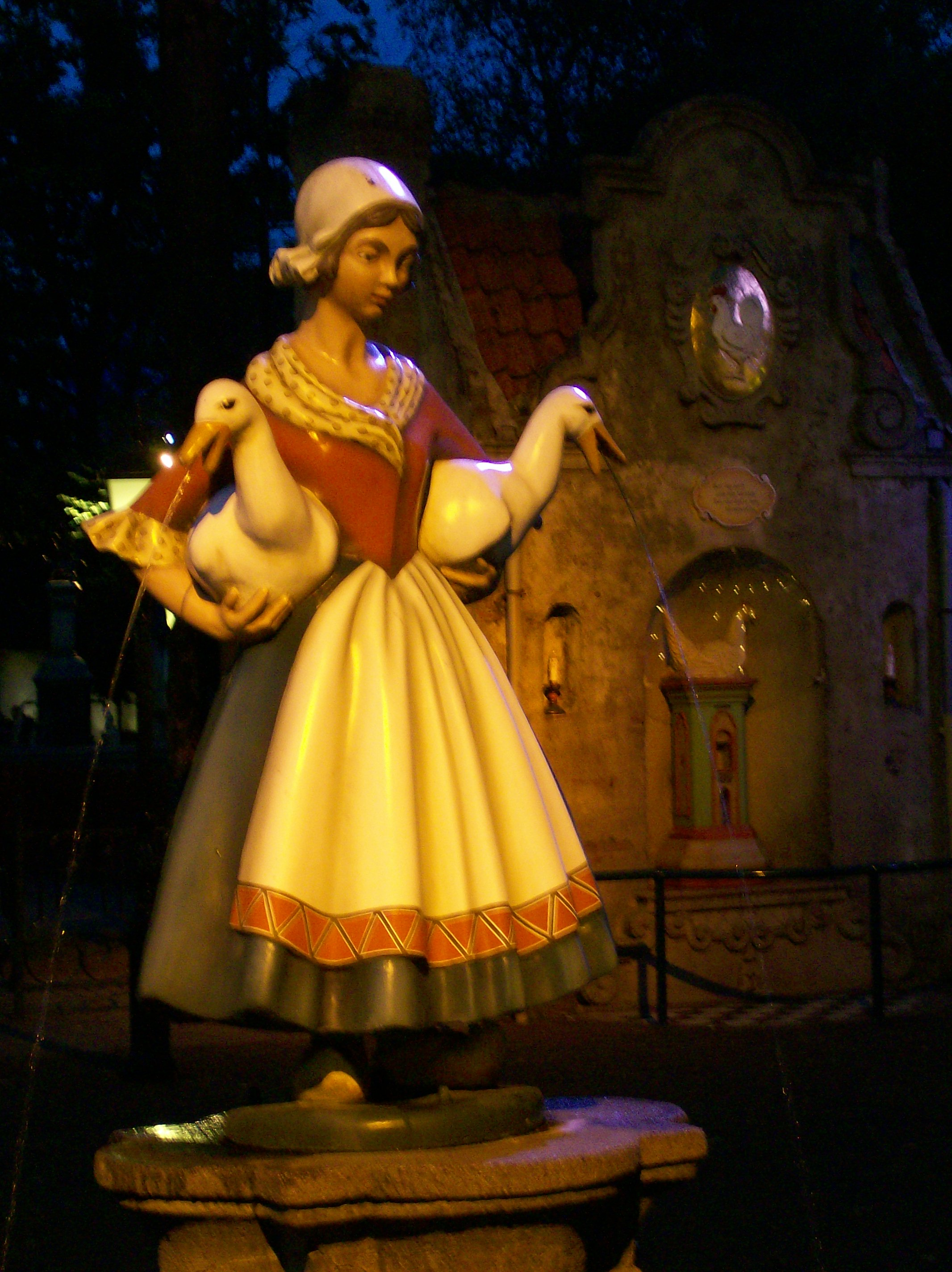 La gardeuse d'oies et La poule aux œufs d'or sur la place Anton Pieck